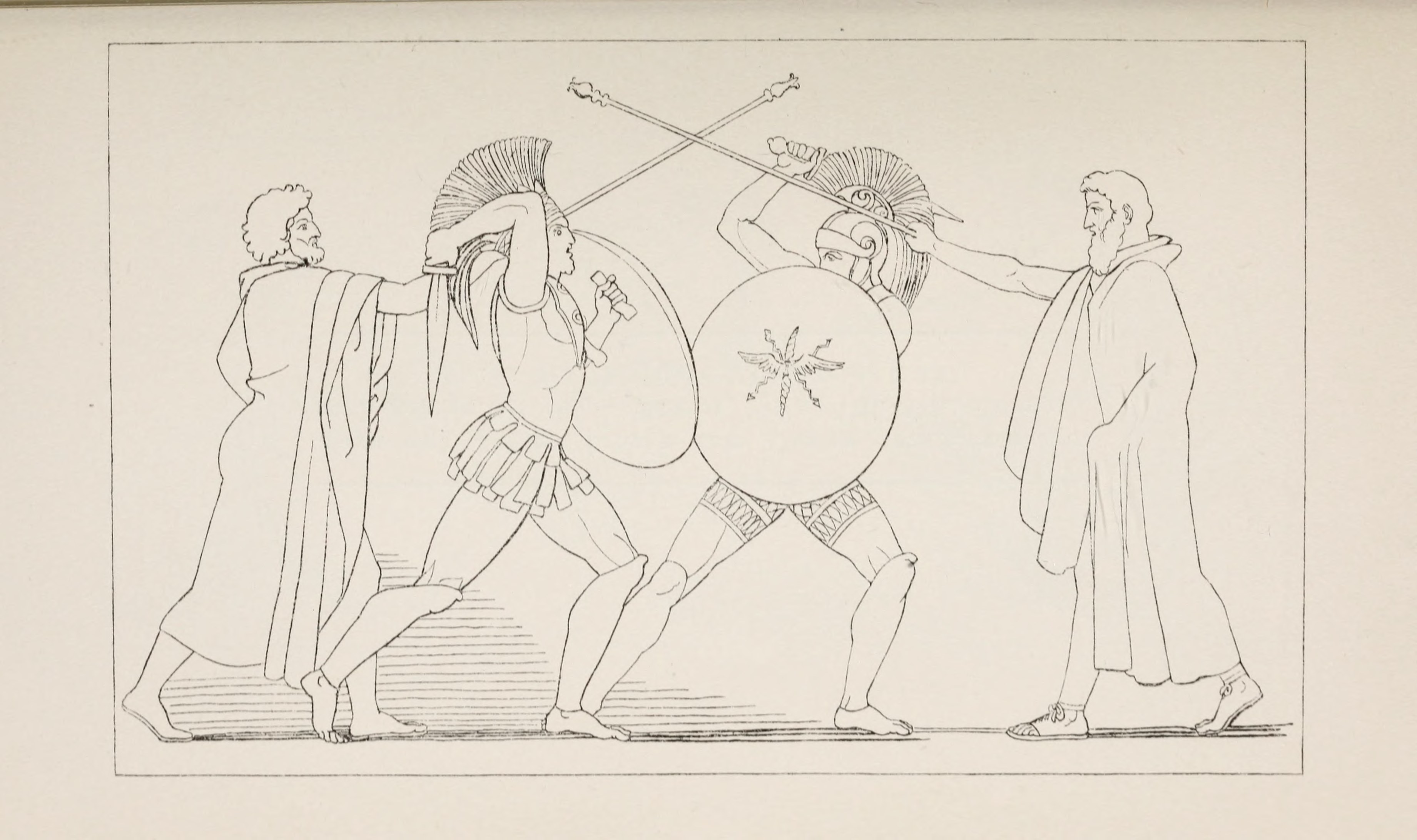 Hektor und Aiax, durch die Herolde getrennt. – Homer, Ilias VII. 277. Schwab, Sagen des klassischen Altertums I. 438.